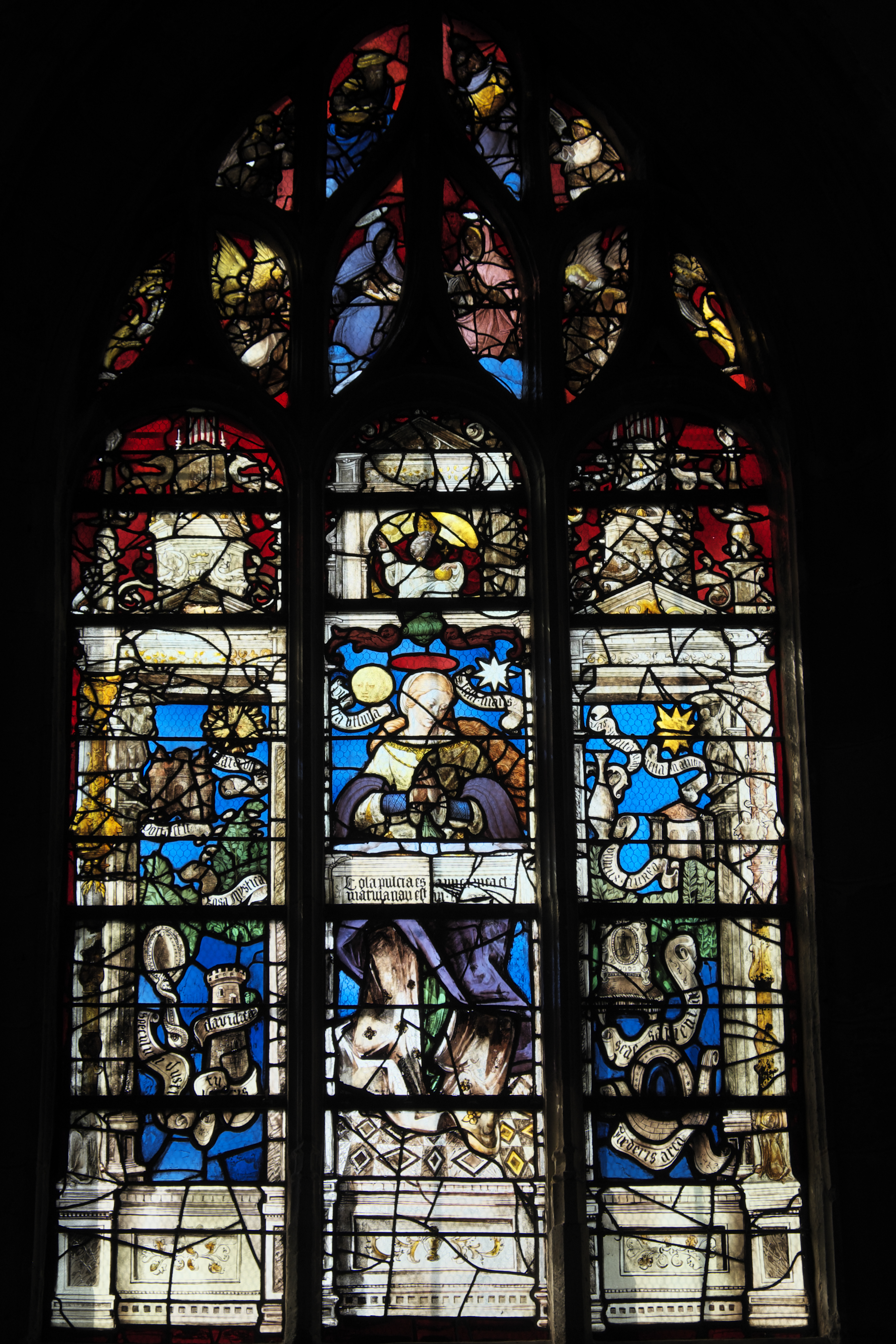 Katholische Kirche Saint-Hilaire in Tillières-sur-Avre im Département Eure (Region Normandie/Frankreich), Bleiglasfenster um 1545/50, von Max Ingrand 1952 vervollständigt; Darstellung: Marienlitanei